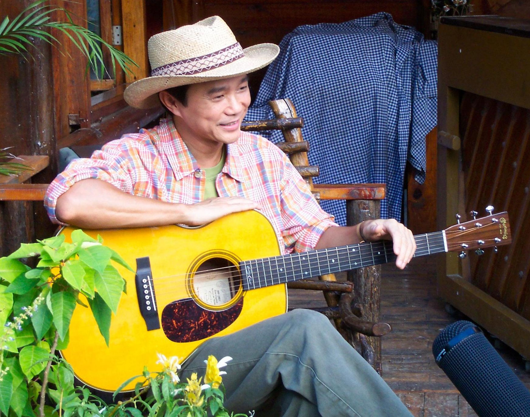 Mr. Albert S.K. Au 區瑞強